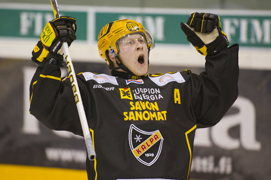 Kuvassa jääkiekkoilia tuomas kiiskinen!